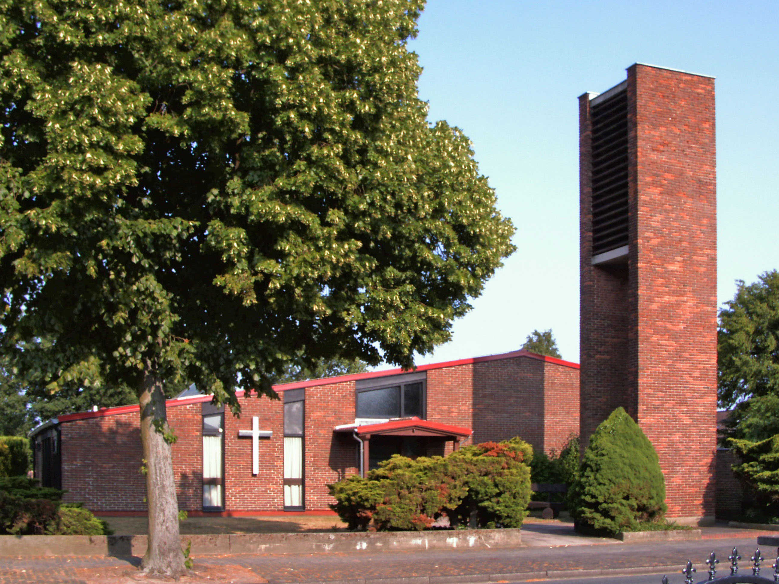 Evangelisch-lutherische Martin-Luther-Kirche in Velstove, Stadtteil von Wolfsburg